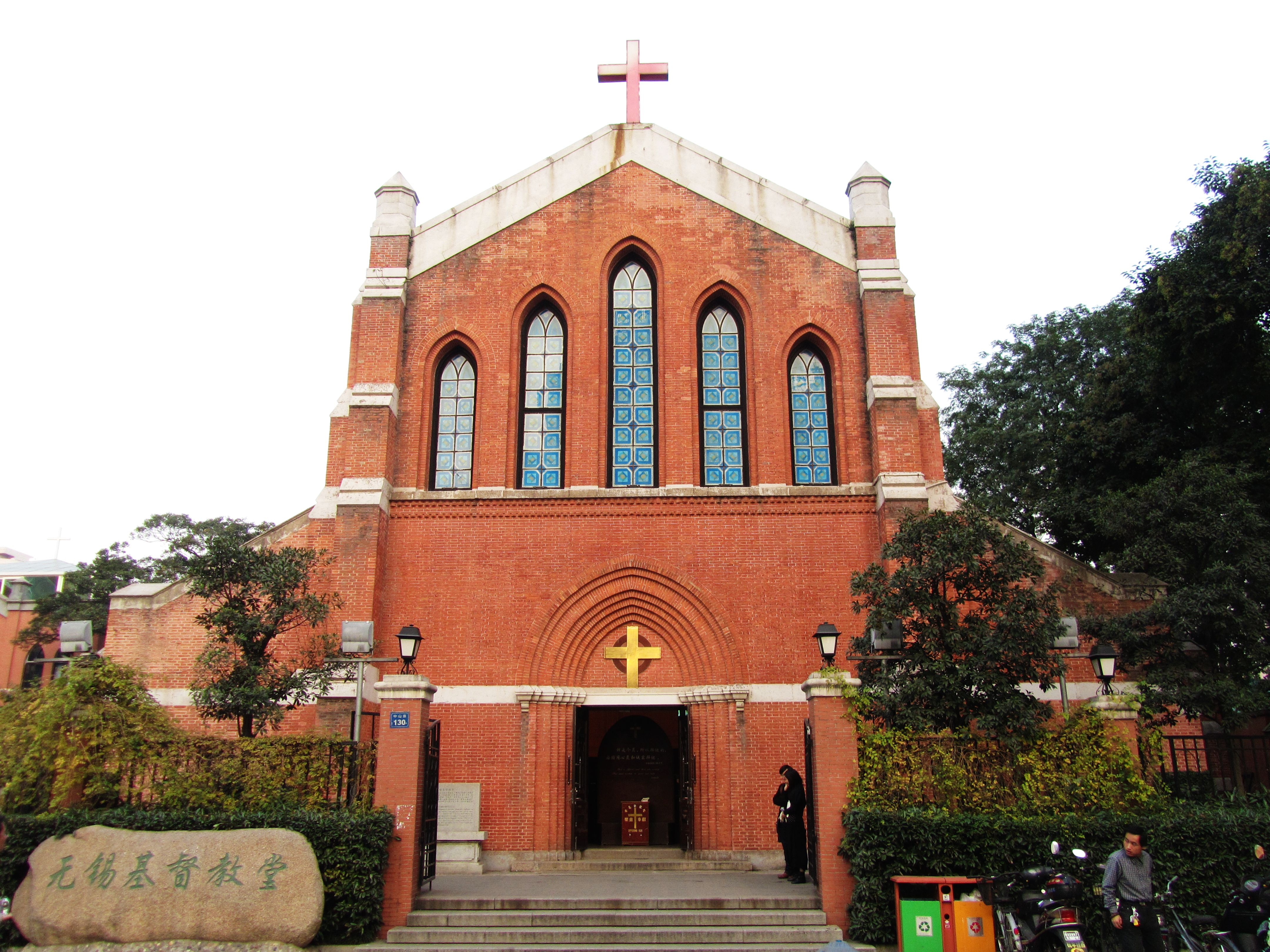 无锡基督教堂，西面。